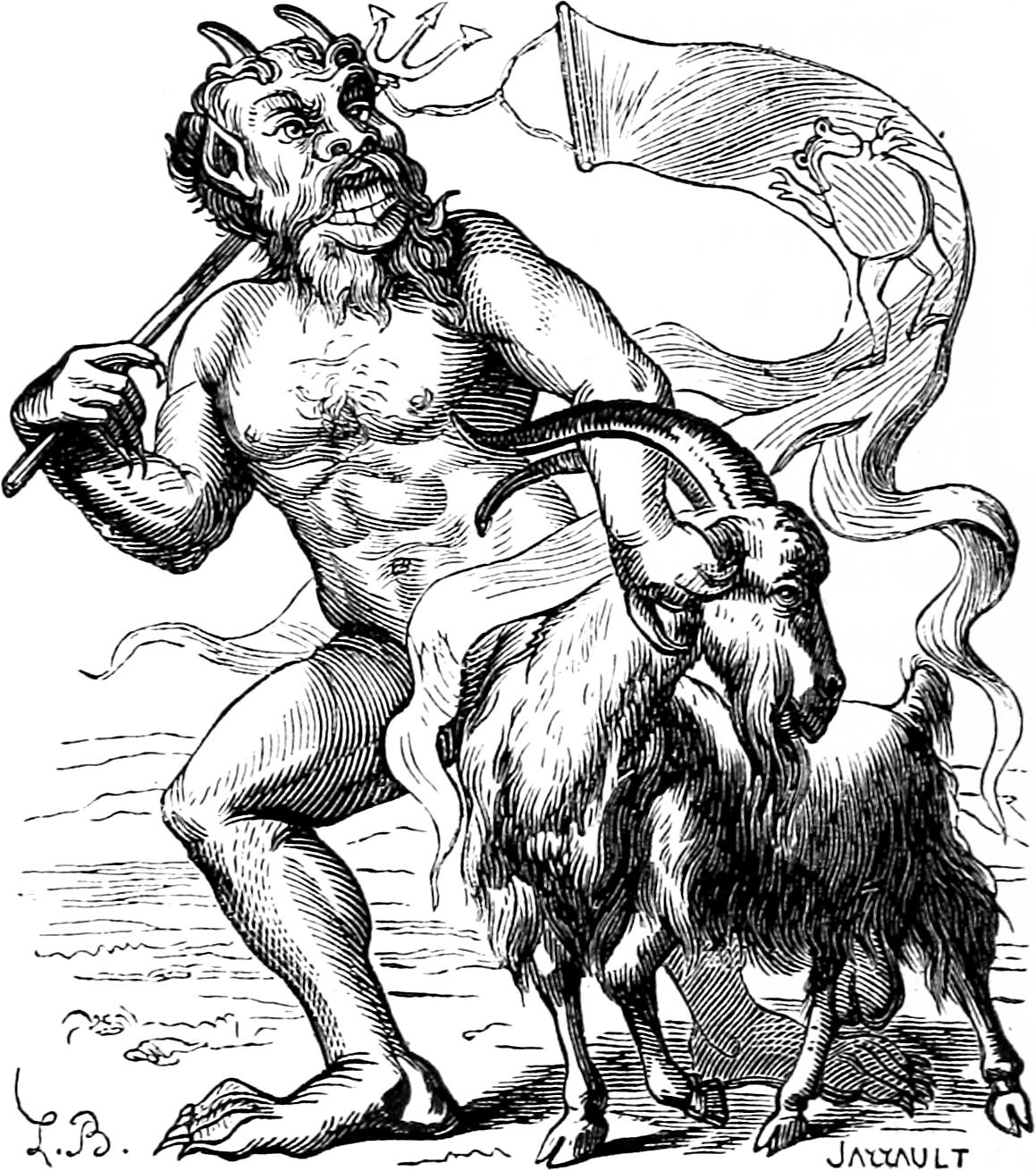 Une illustration pour l’article Azazel dans le Dictionnaire infernal par Collin de Plancy.